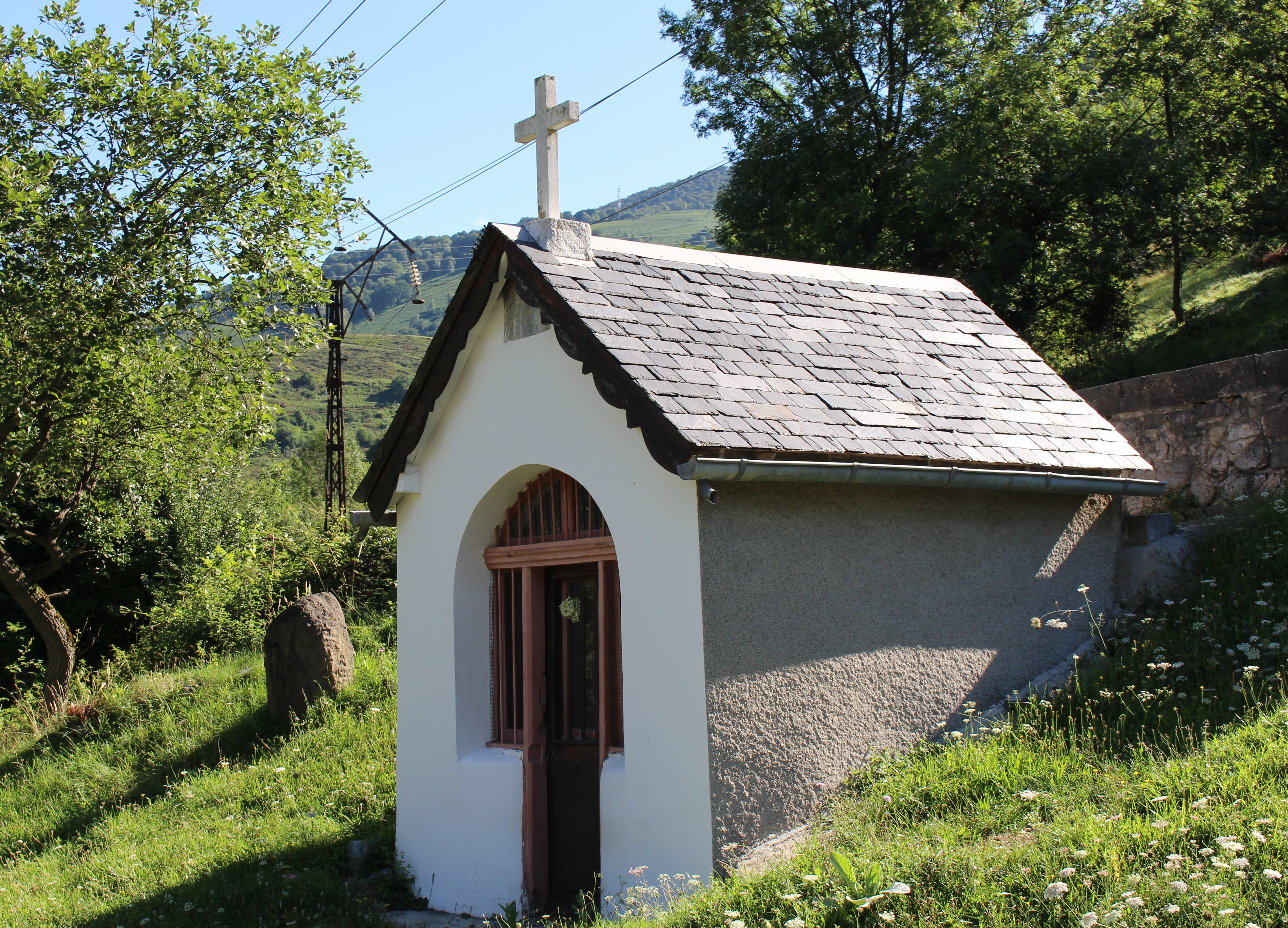 Chapelle Sainte-Anne d'Ilhet (Hautes-Pyrénées)